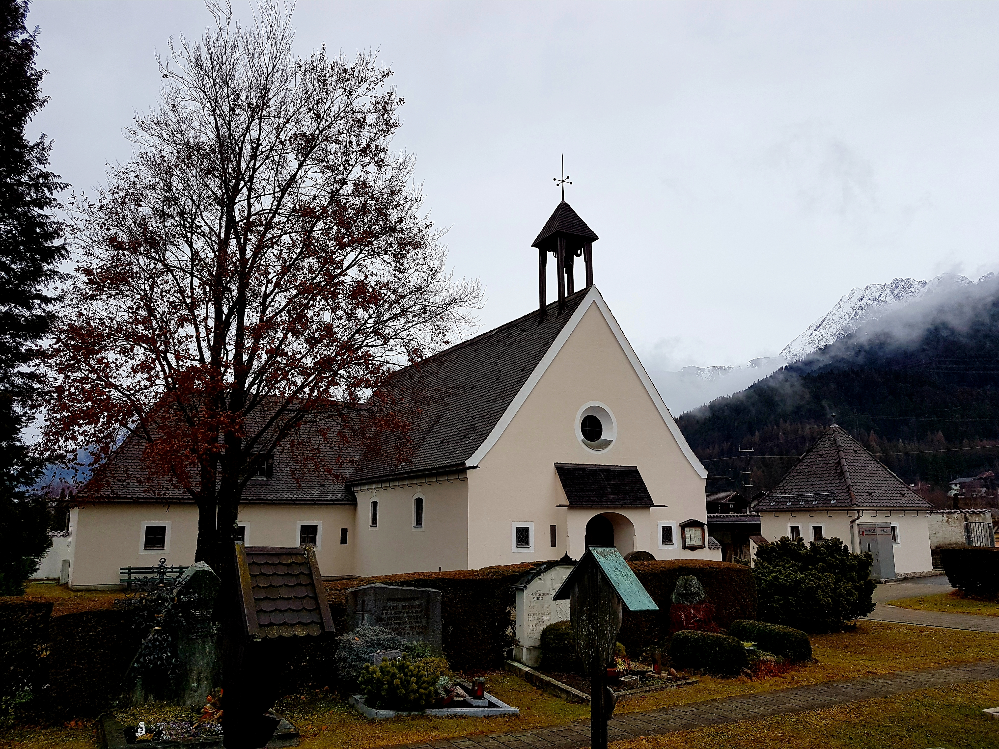 Friedhof Mittenwald, Landkreis Garmisch-Partenkirchen, Bayern